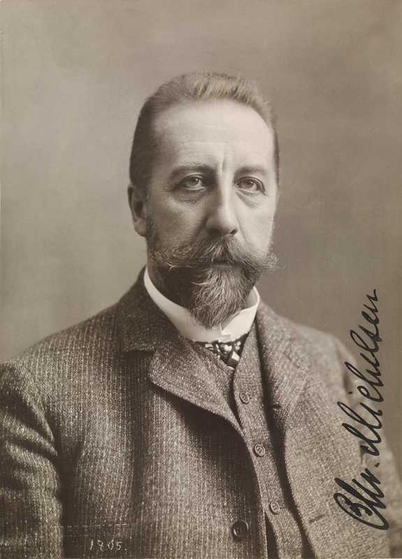 Christian Michelsen, portrett, politiker, statsminister, autograf.